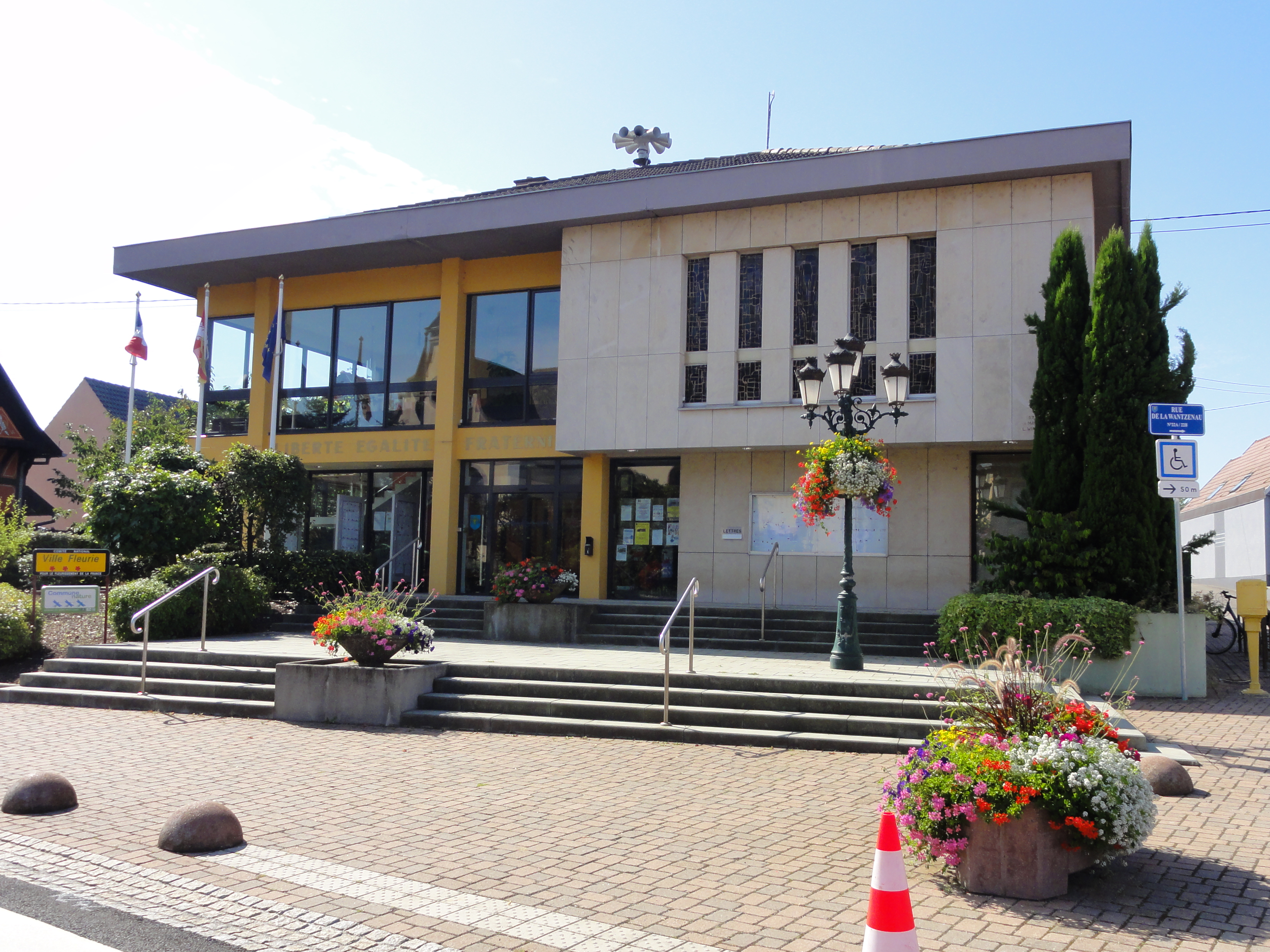 Alsace, Bas-Rhin, Reichstett, Mairie (XXe).